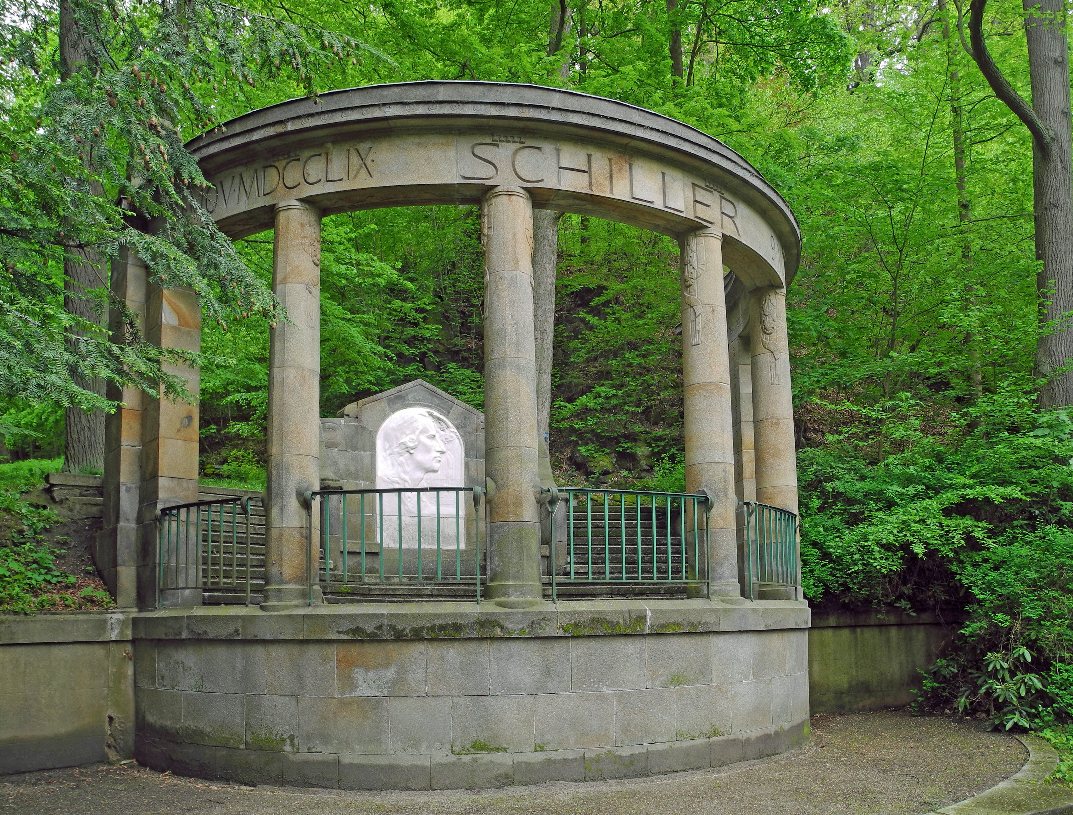 Schiller-Denkmal in Karlsbad - Karlovy Vary